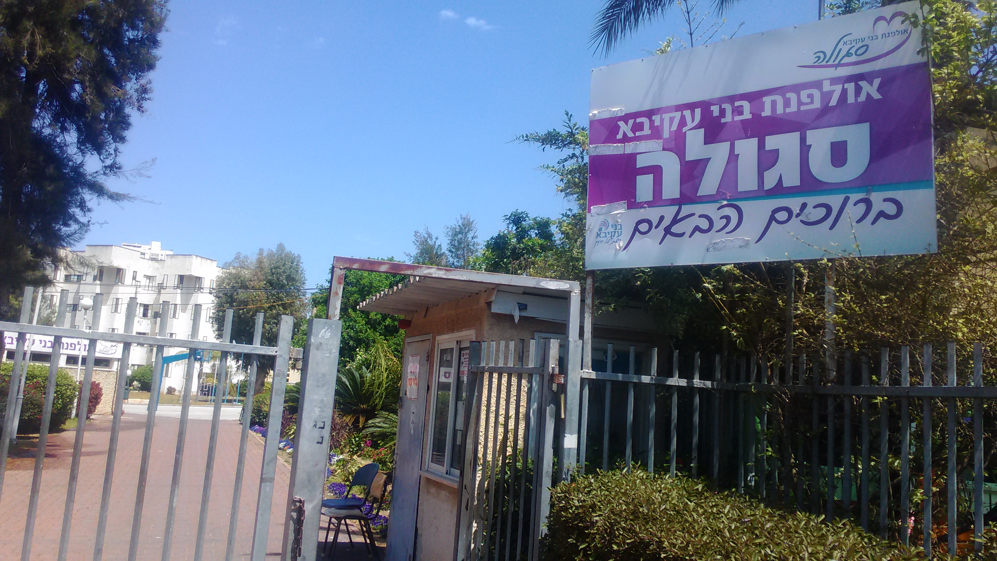 אולפנת סגולה, קרית מוצקין